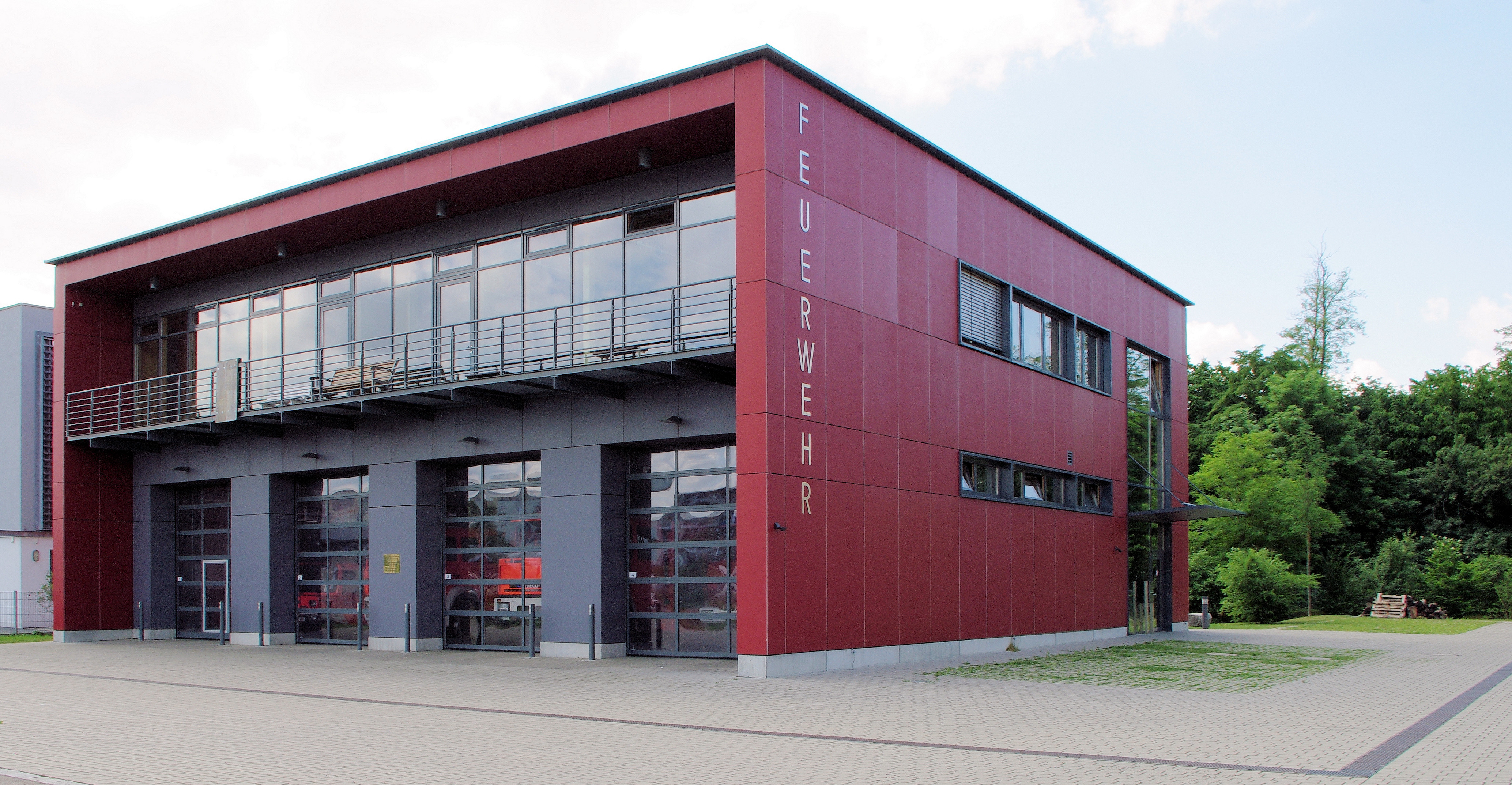 Feuerwehr Freiburg im Breisgau Freiwillige Feuerwehr Rieselfeld